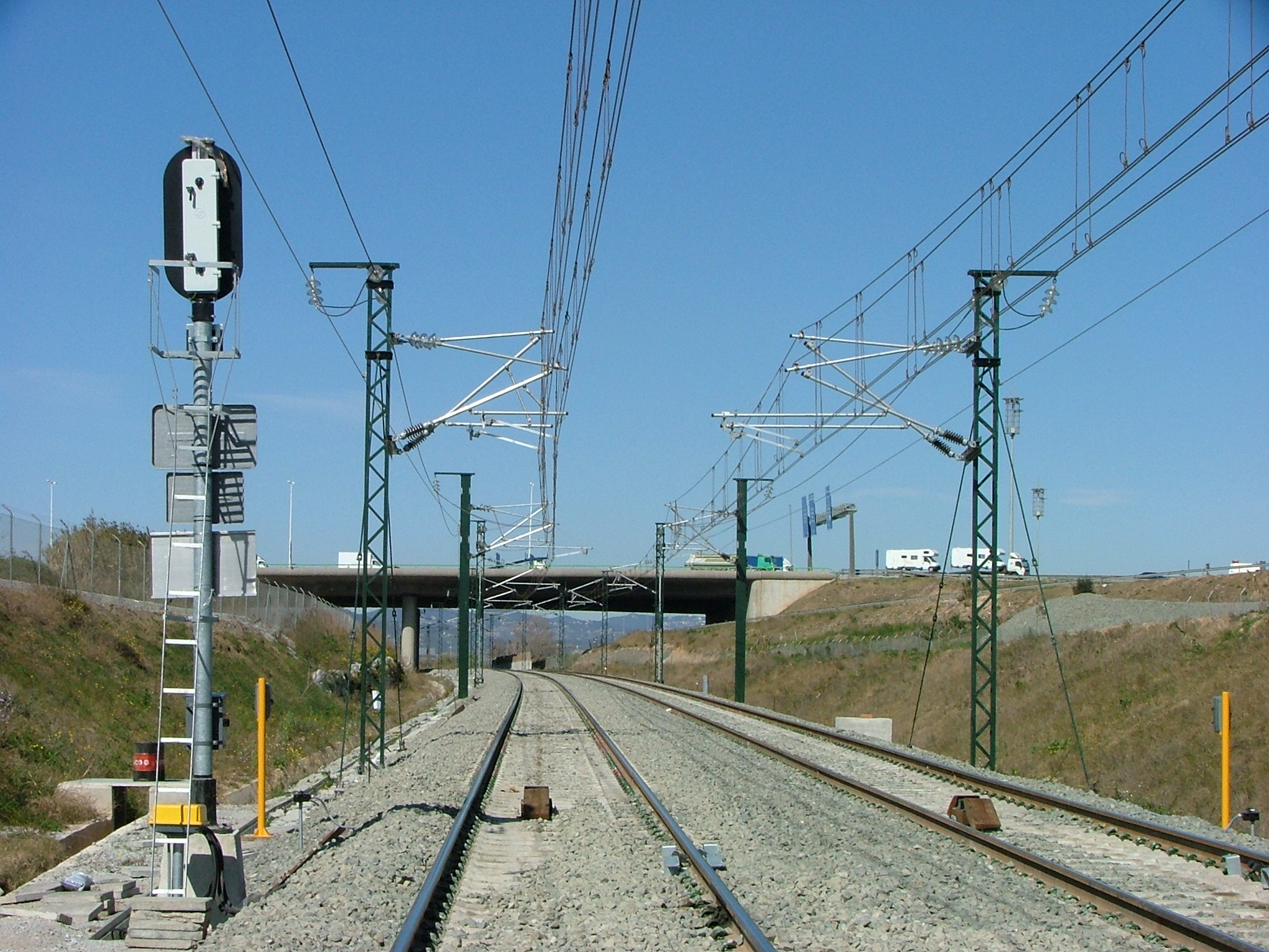 Catenaria en el ramal del Llobregat. Entre Castellbisbal y Can Tunis. Red de ADIF. Barcelona. España